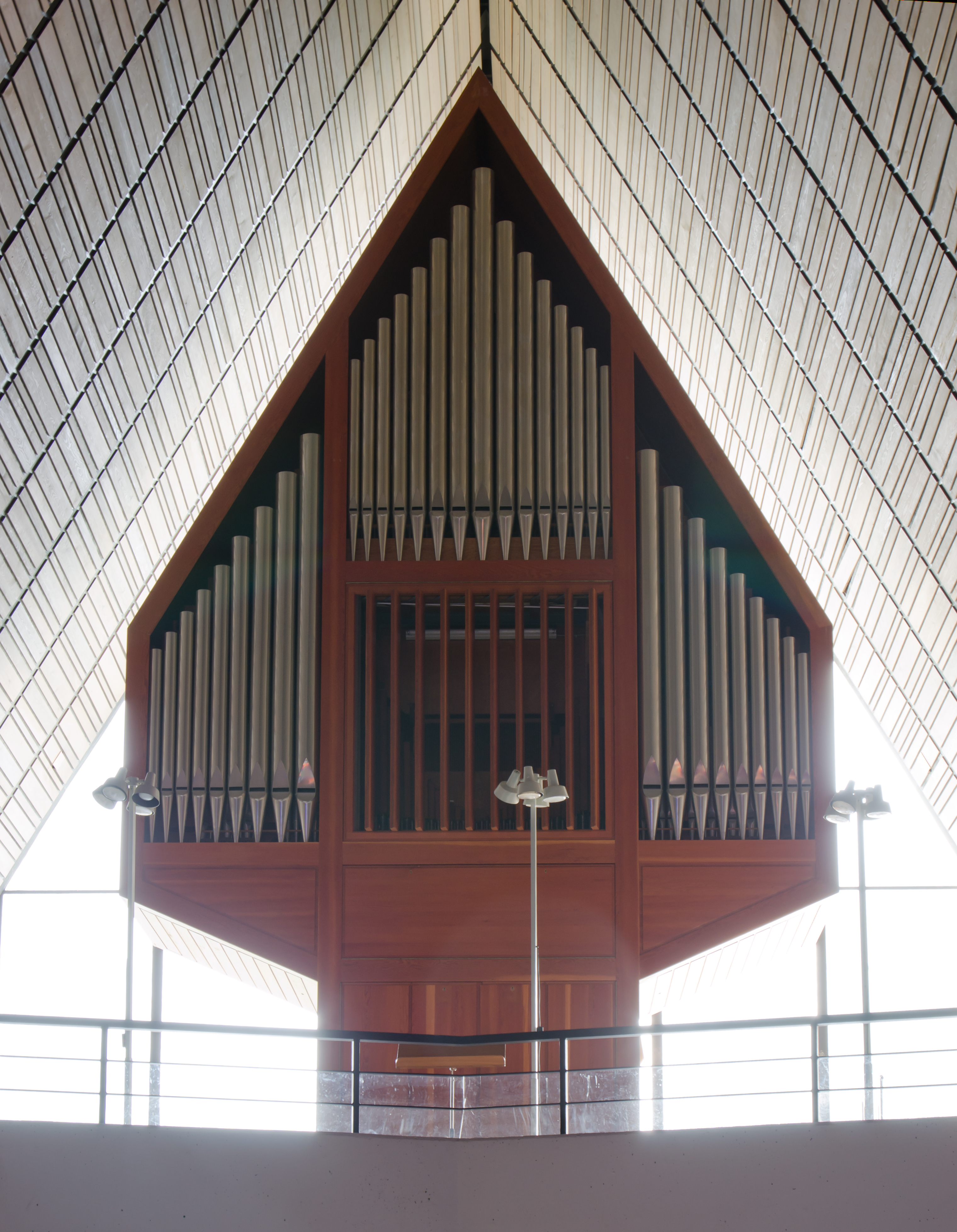 HH-Oldenfelde Bonhoeffer-Kirche Orgel